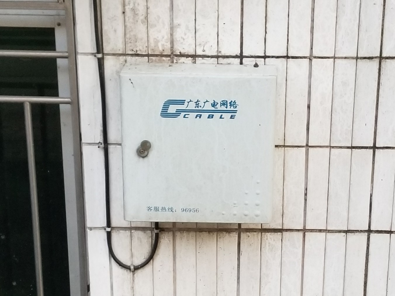 广东广电网络旧分线箱